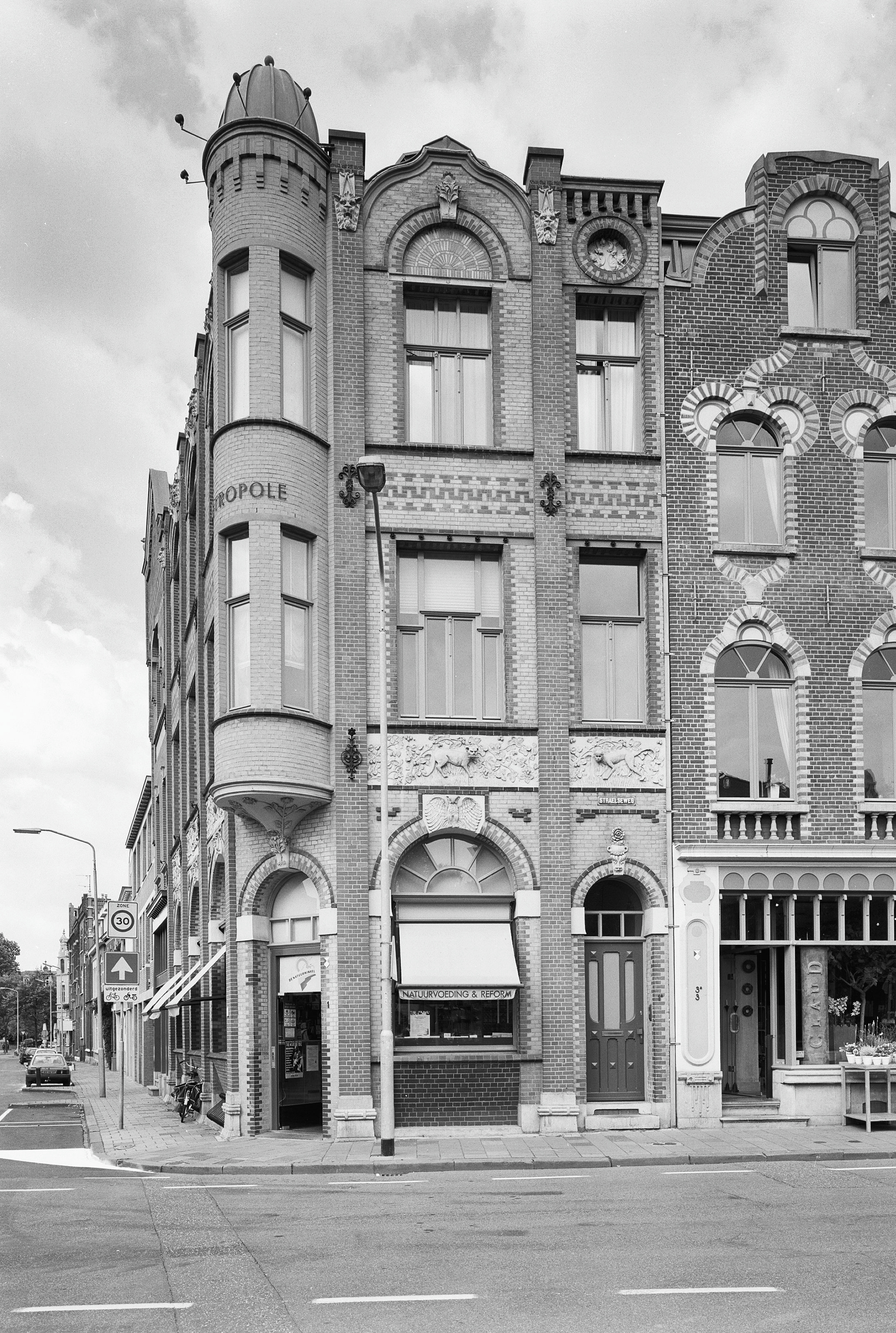 Hoekpand Noord-Binnensingel en de Straelseweg (rechts)